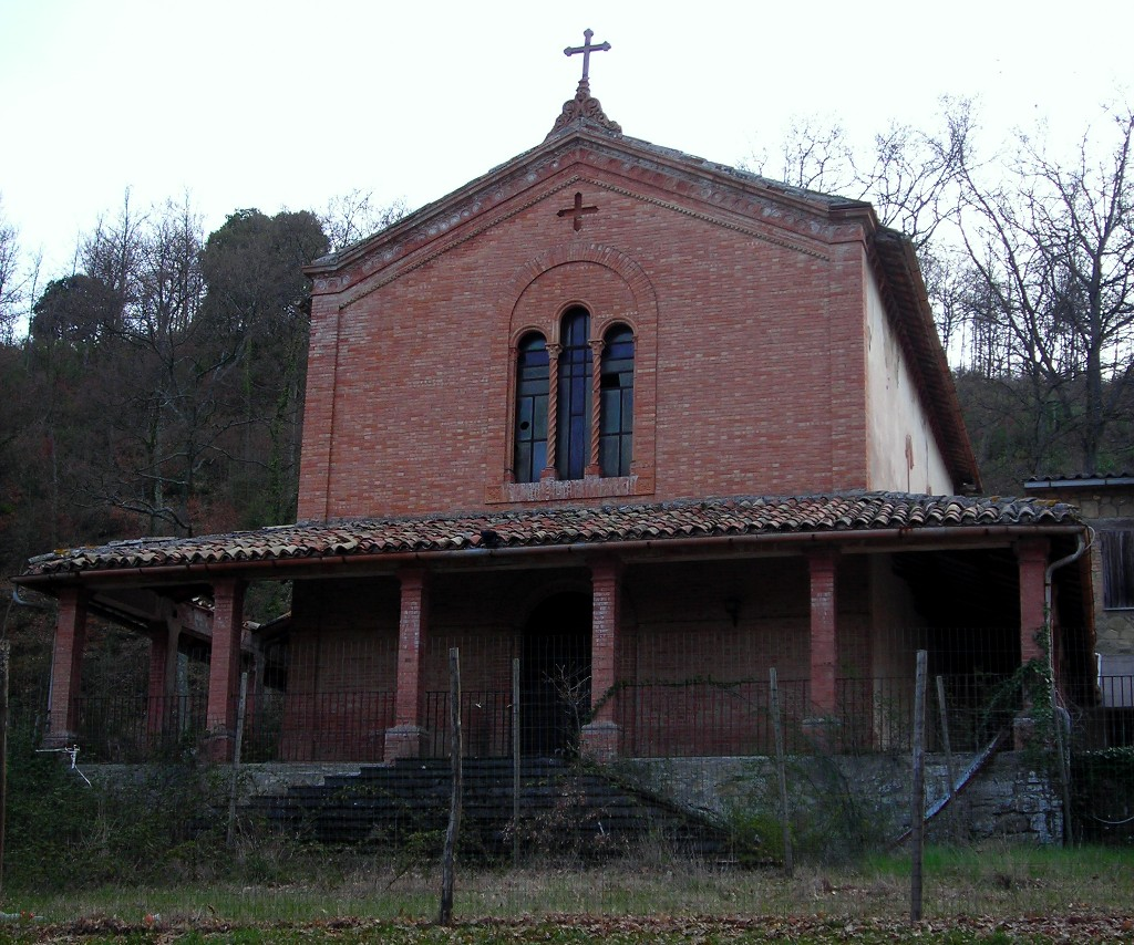 sanctuary of Madonna della Valle, Torre del Colle, Bevagna, Perugia, Umbria, Italy